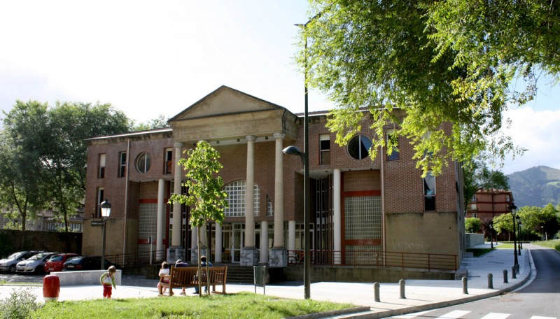 Maizpide euskaltegi-barnetegiaren fatxada